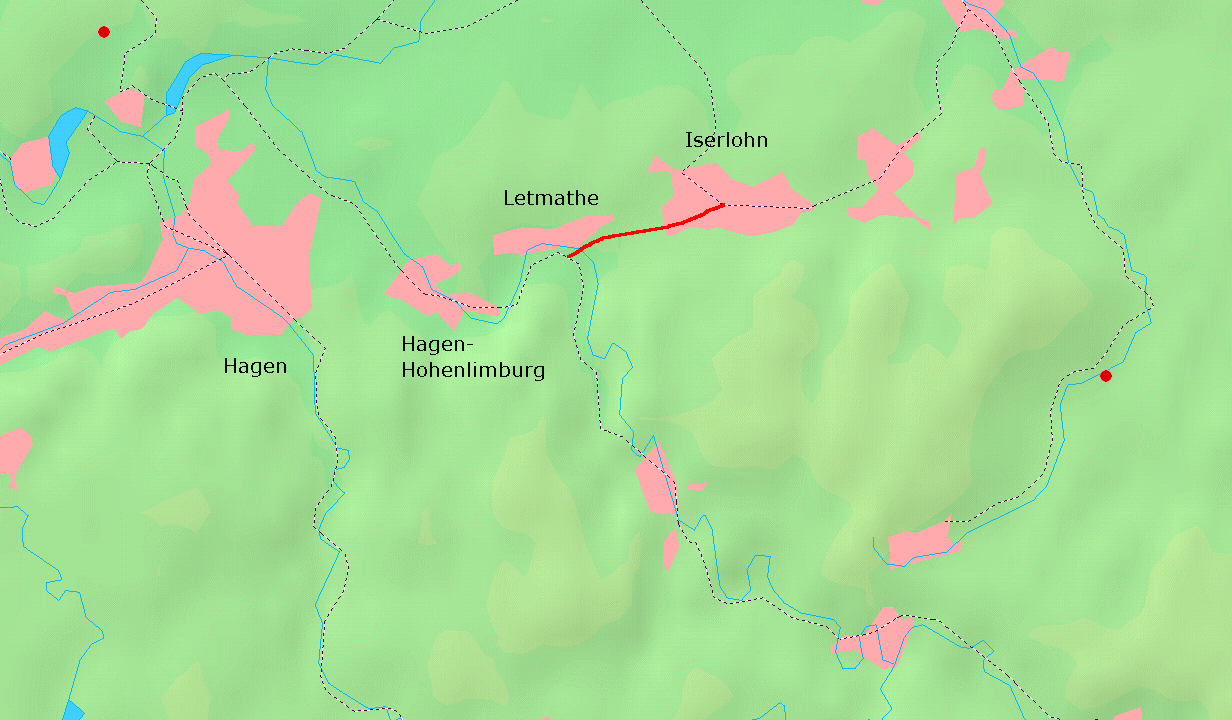 Karte der Iserlohner Bahn